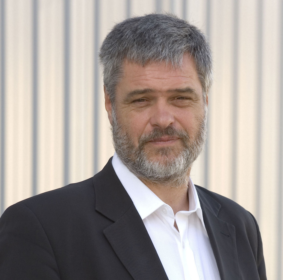 Président fondateur du Groupe VALOREM